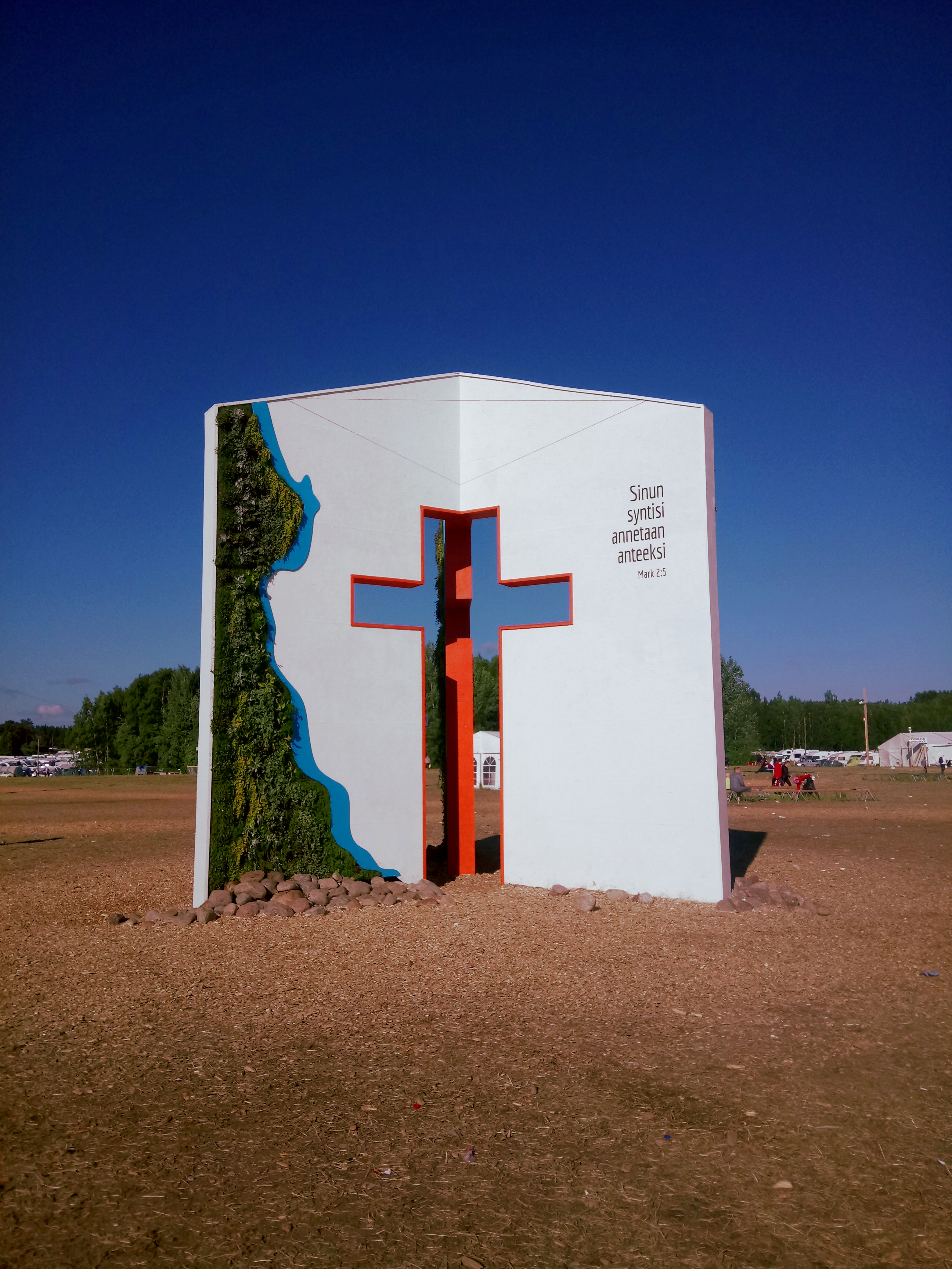 Juhlaportti vuoden 2018 suviseuroissa.